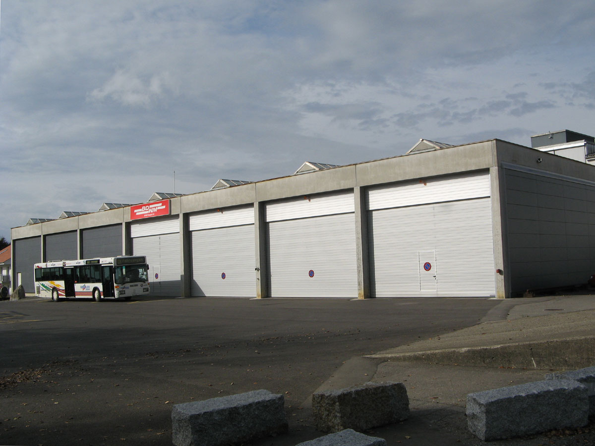 Ehemaliges Depot der Wohlen-Meisterschwanden-Bahn in Fahrwangen, dient heute als Busdepot.